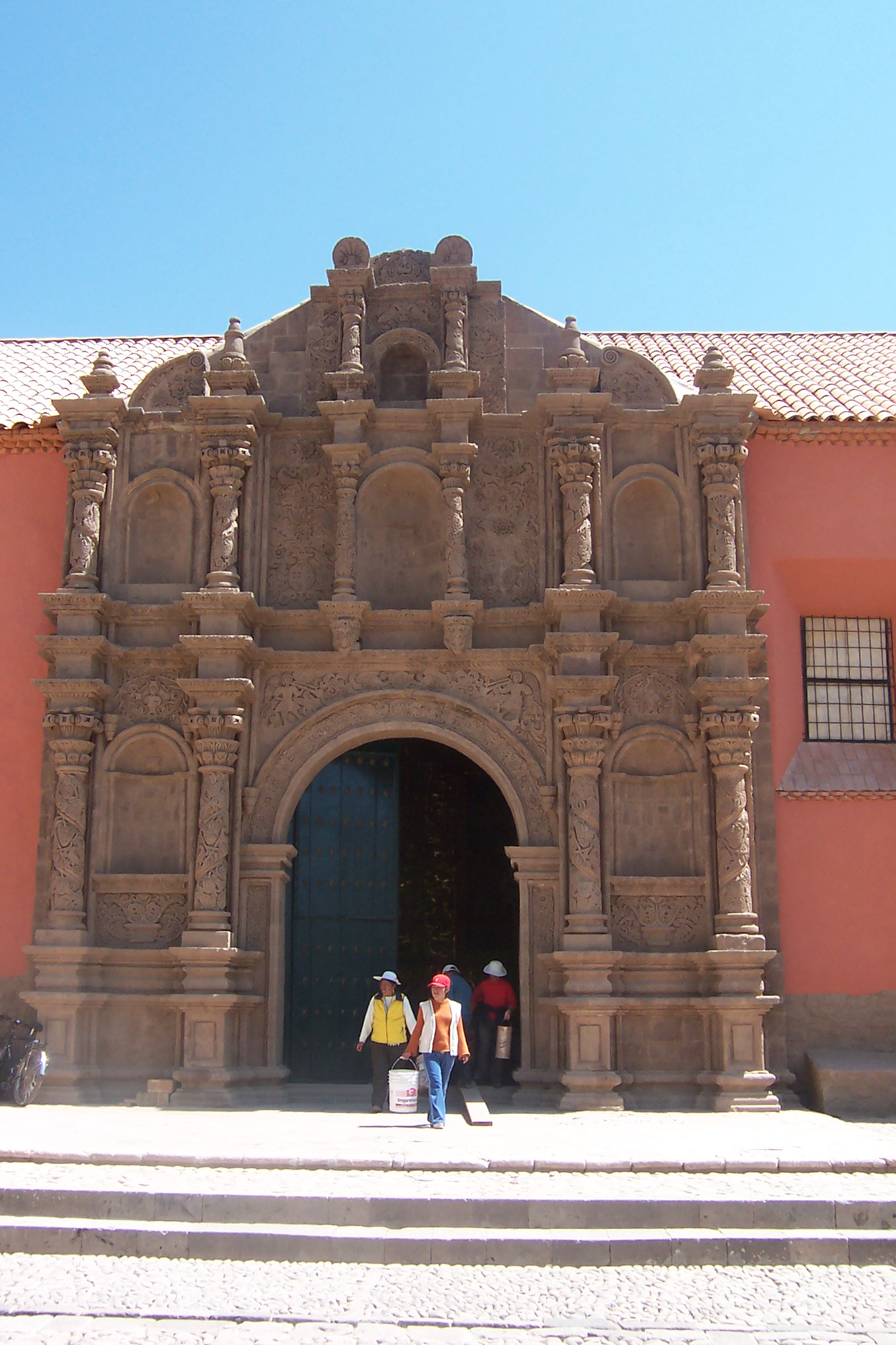 Juli. San Juan de Latrán. Portada lateral Autor: Alfredobi Fecha: Agosto 2006